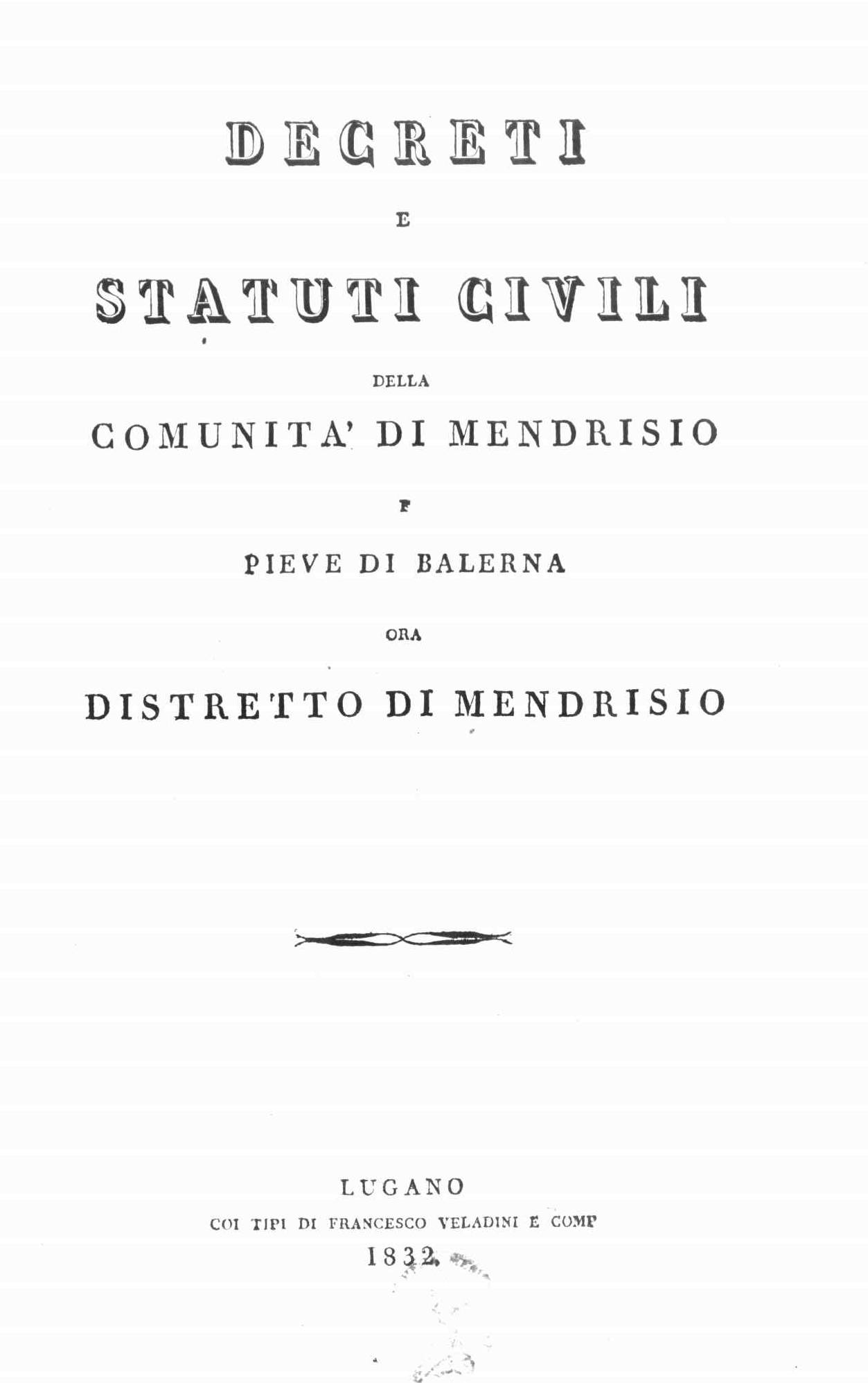 Frontespizio